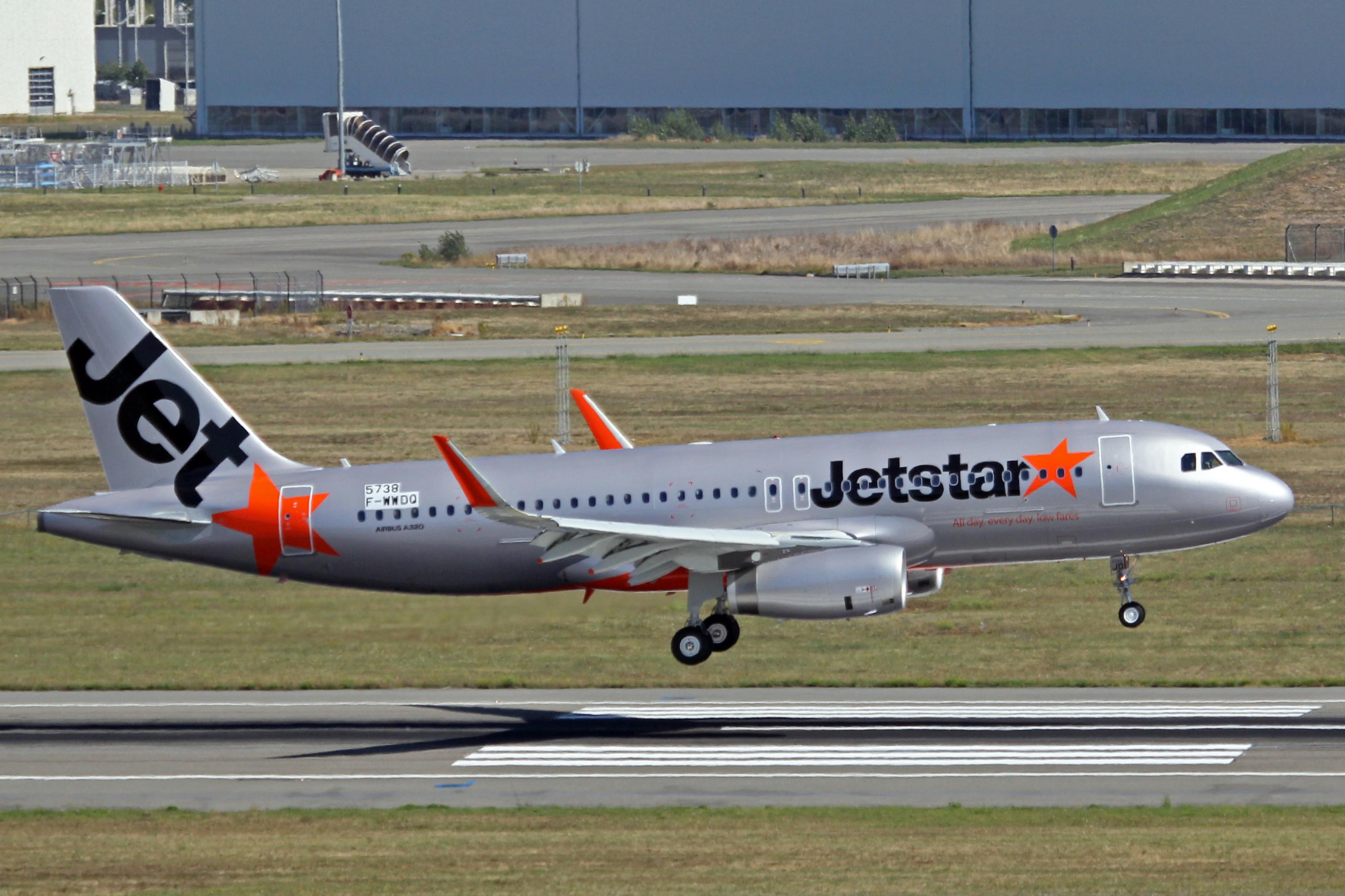 F-WWDQ(5738 B-KJD) A320-232S JetStar Hong Kong TLS 24SEP13